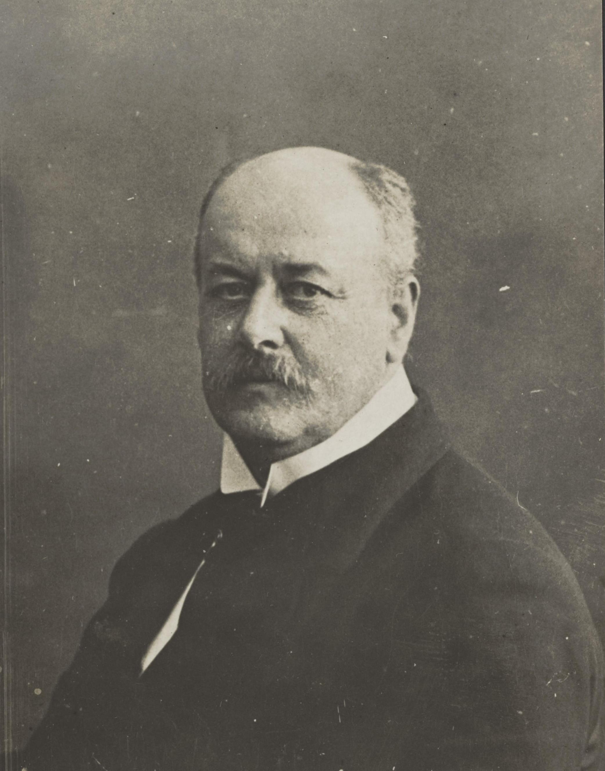 Foto van Anton August van Vloten, wethouder te Maarsseveen, dd 1920.